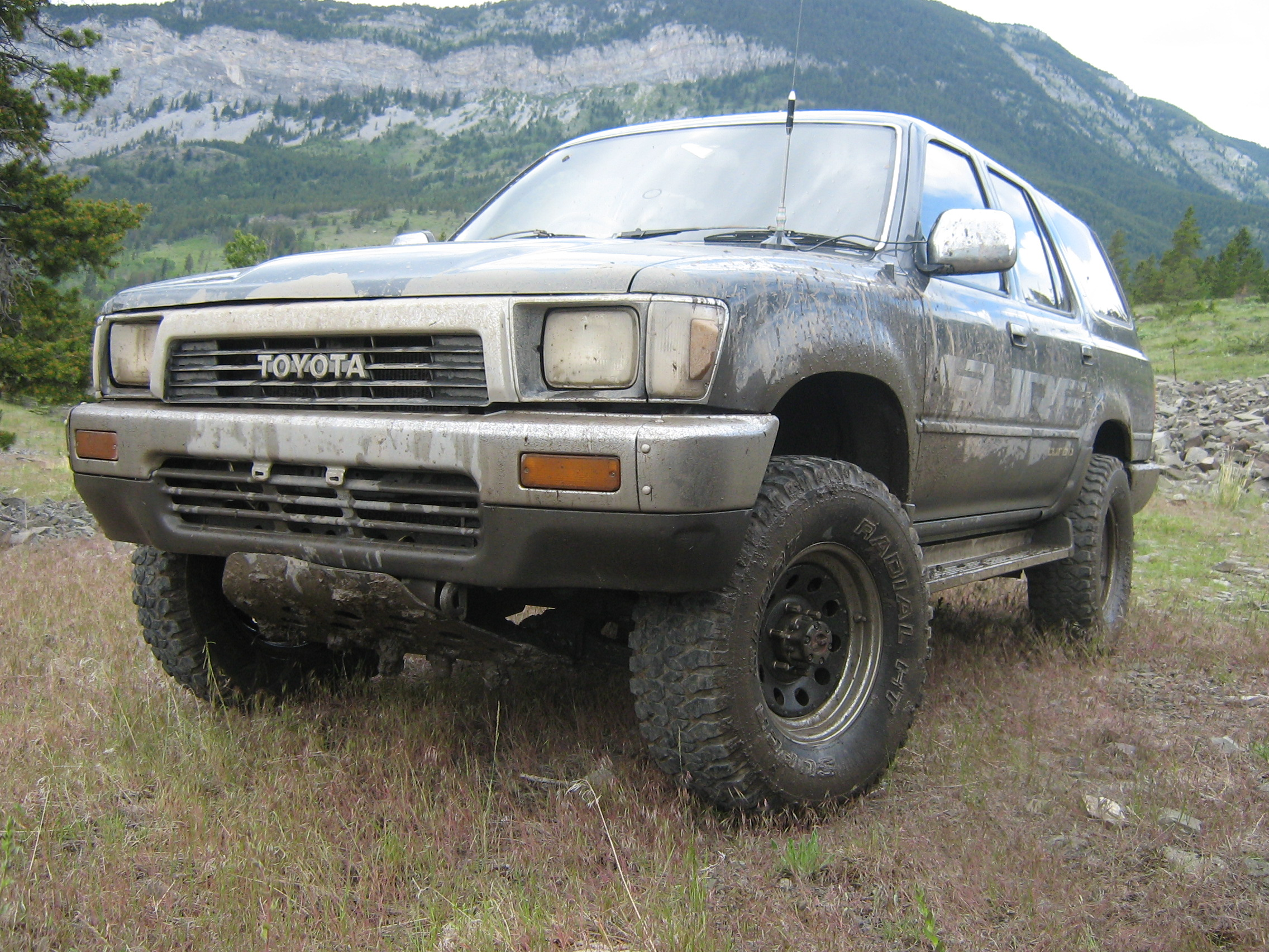 1989 Toyota Hilux SURF 4x4